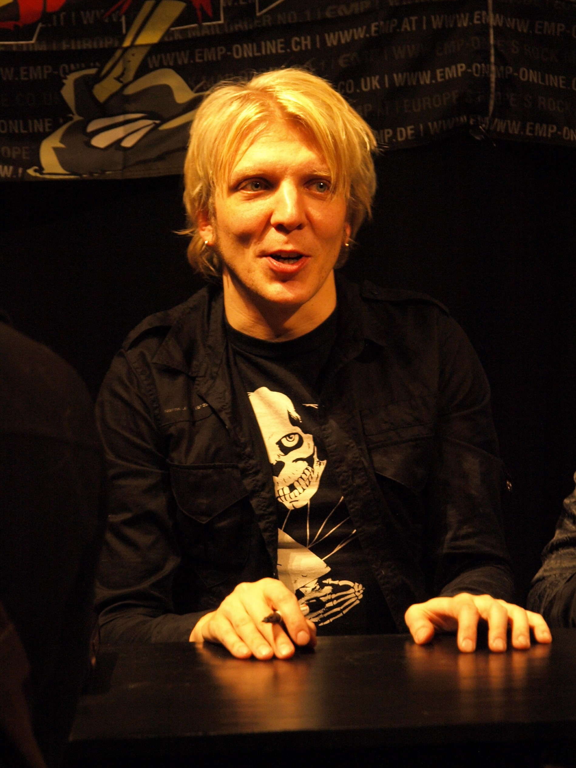 Mikko Sirén at Helsinki Metal Meeting 2010